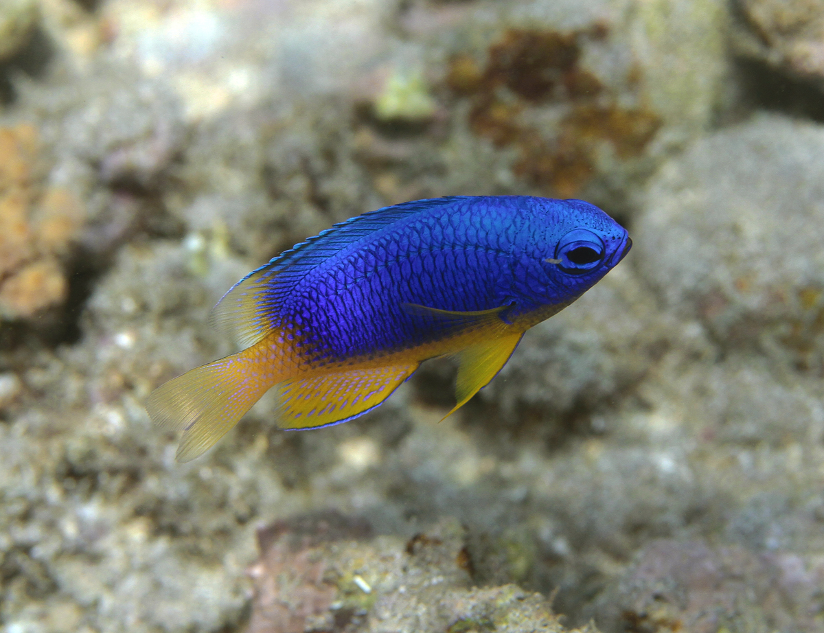 Une demoiselle bleue et jaune (Pomacentrus caeruleus) à la Réunion.